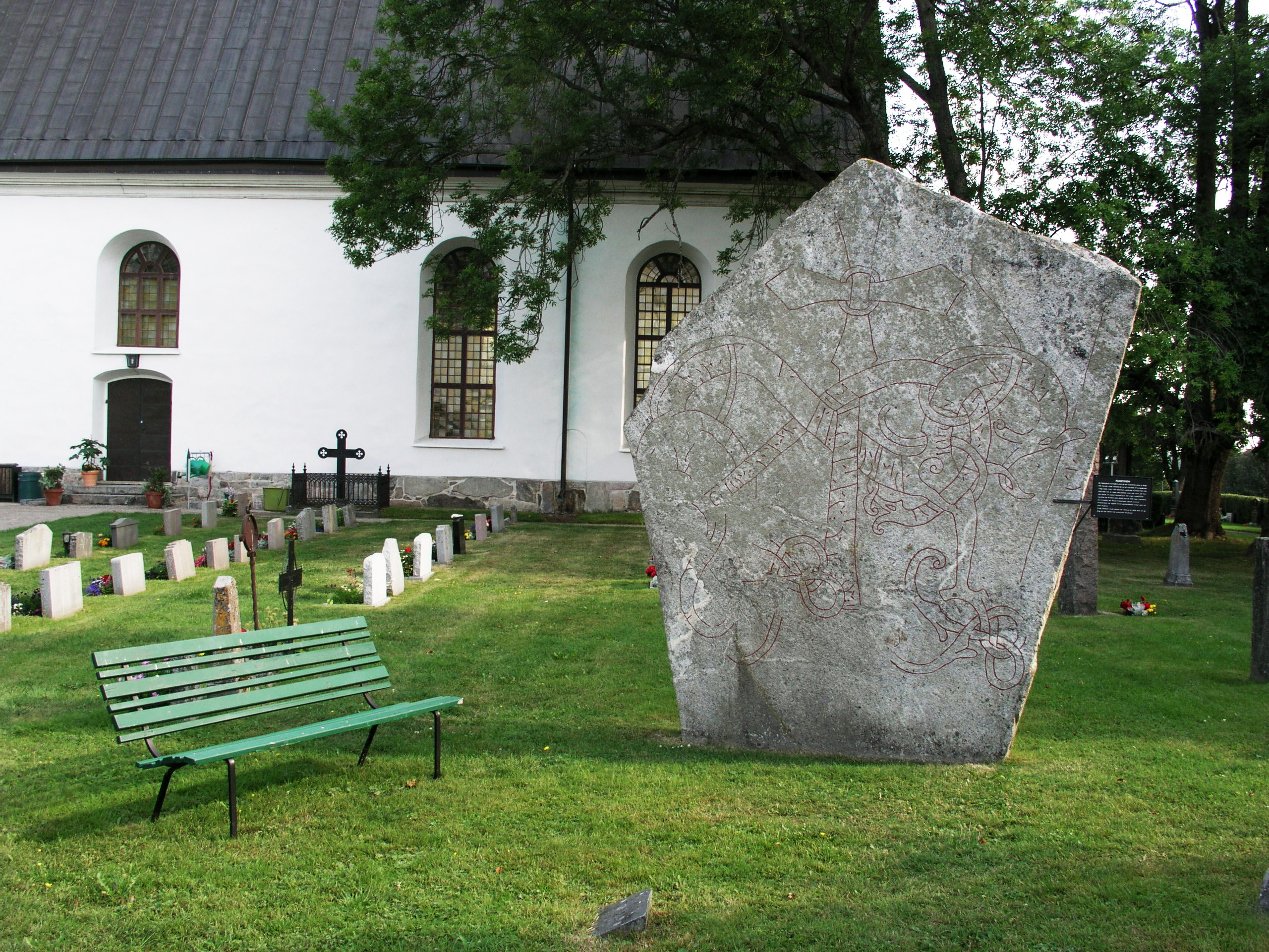 Hälsingtuna church, Runestone, Hudiksvalls kommun.